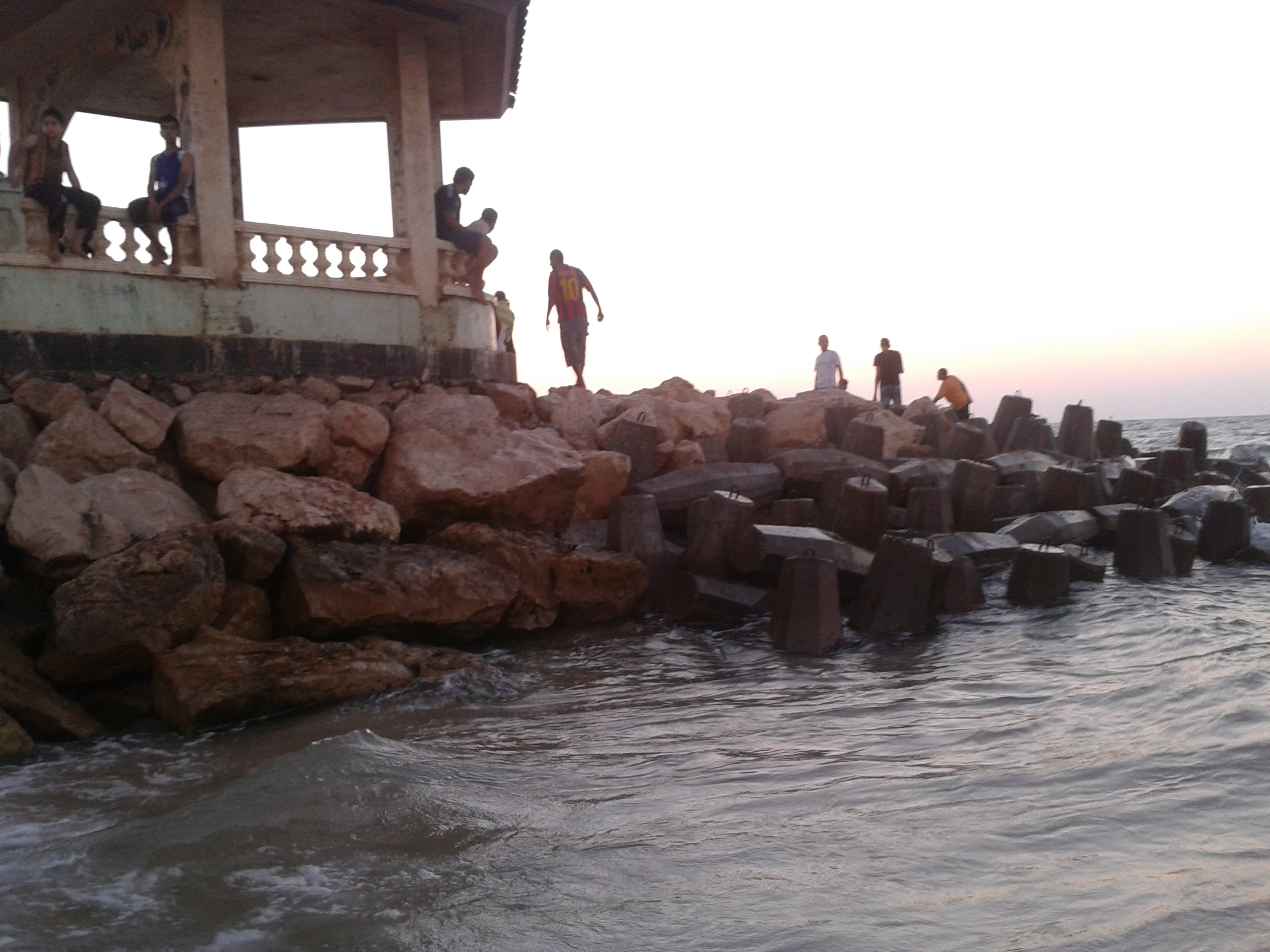 شاطئ مدينة العريش - سيناء صيف 2012